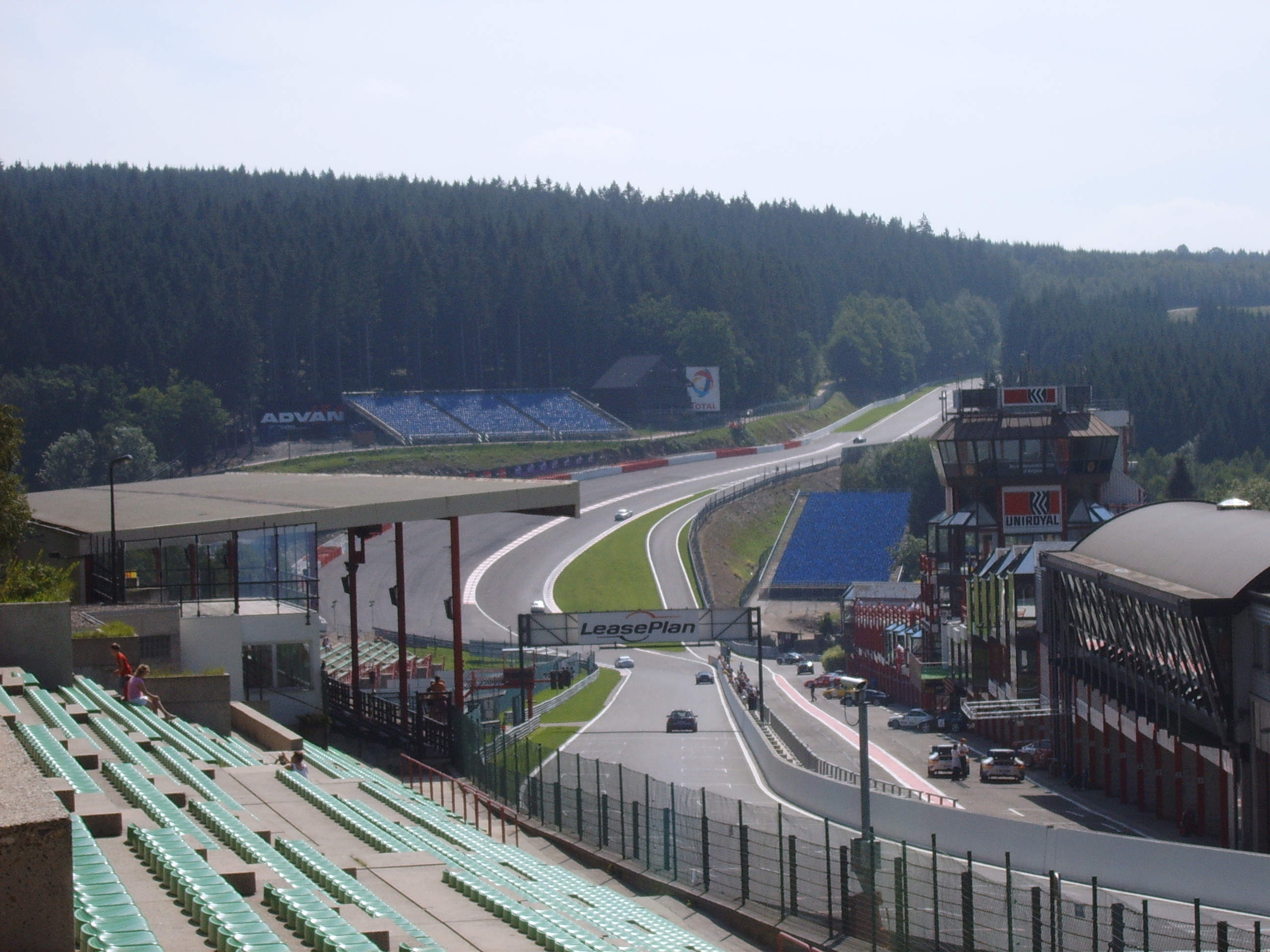 Circuit de Spa-Francorchamps, le "raidillon" au franchissement de la vallée de l'Eau Rouge. Personal picture, I (Vberger) set it in public domain. August 2005